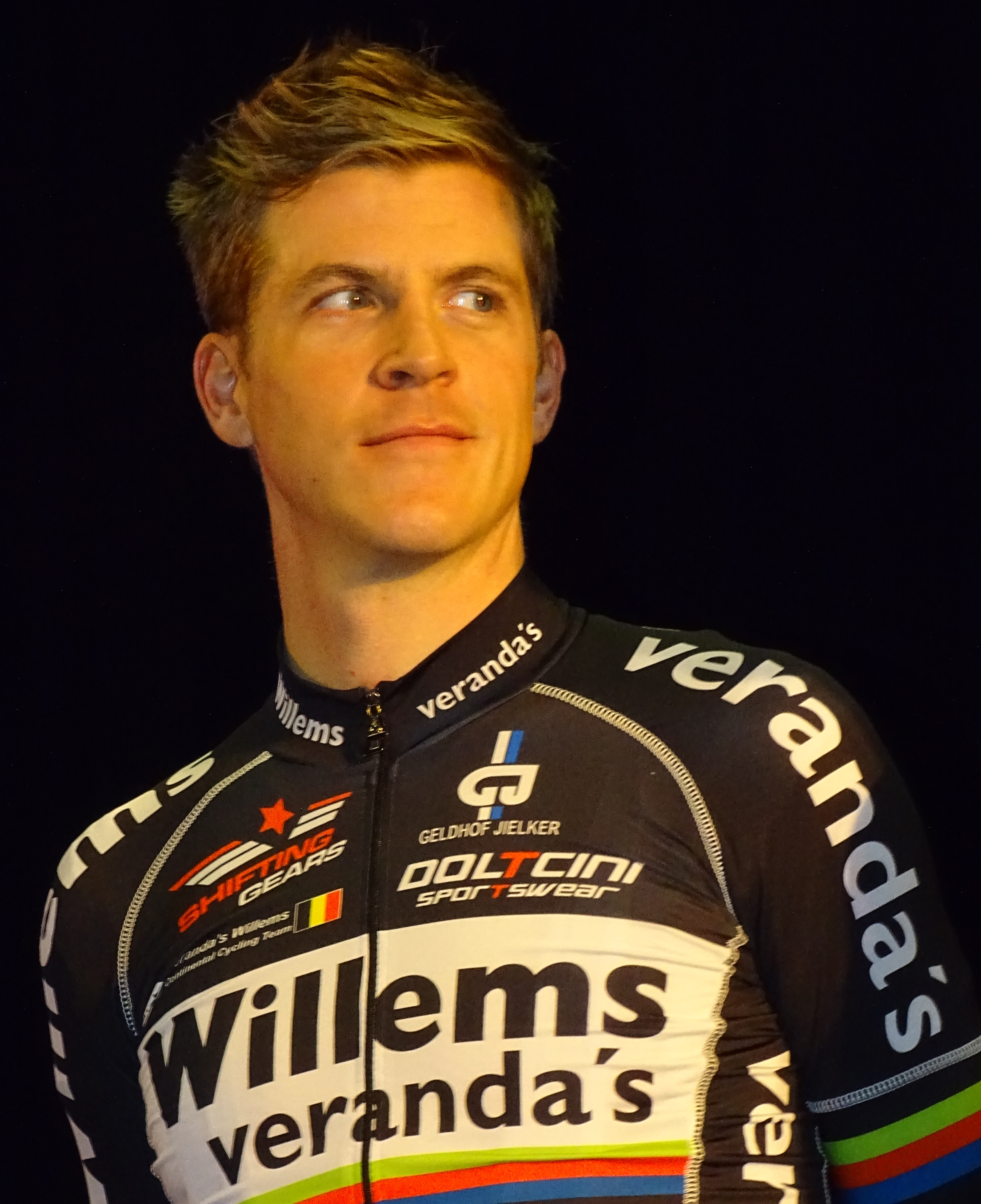 Reportage réalisé le vendredi 20 mars à l'occasion du départ de la Handzame Classic 2015 à Bredene, Belgique.